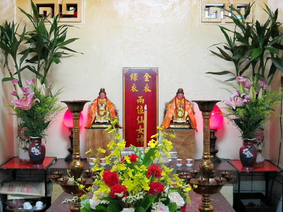 正德宮金衣仙女與綠衣仙女